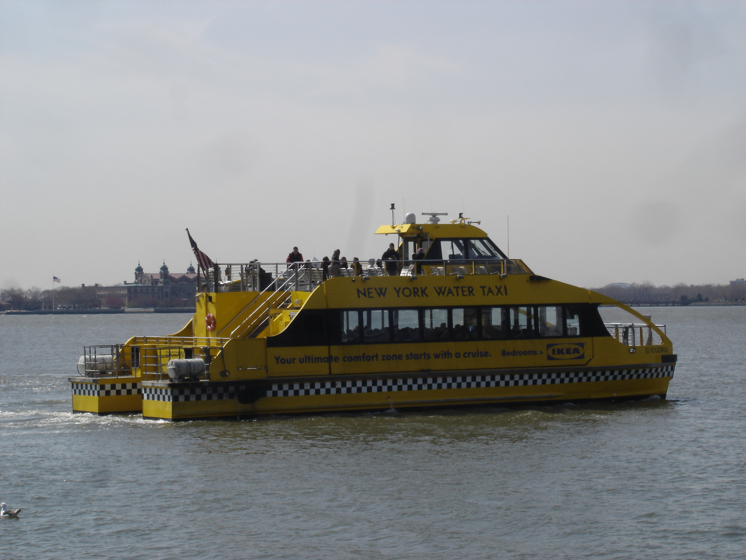 Uno de los Taxis Acuáticos de Nueva York.